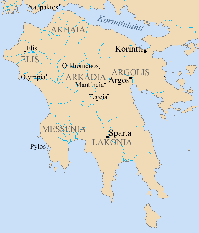 Peloponnesos Peloponnesolaissodan aikana. Tein kartan pohjan sivulla löytyvällä työkalulla. Saksankielisestä wikistä löytyy viesti, jonka mukaan tällä tehdyt kartat ovat PD.